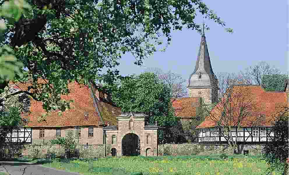 Außenansicht von Kloster Wöltingerode